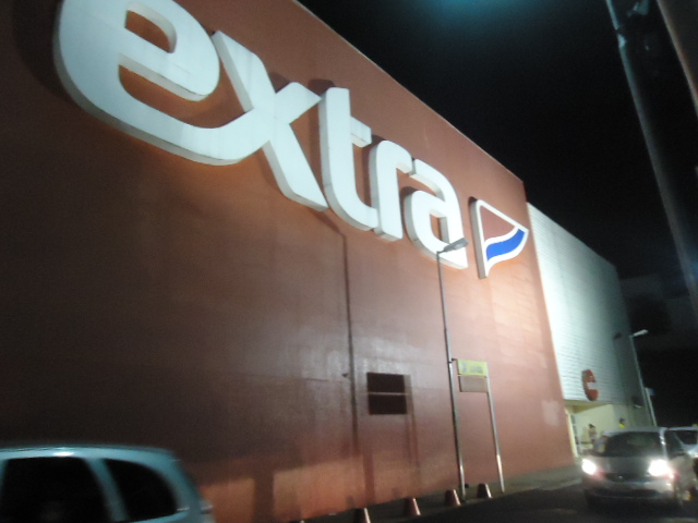 Hipermercado Extra - região central de Uberlândia.